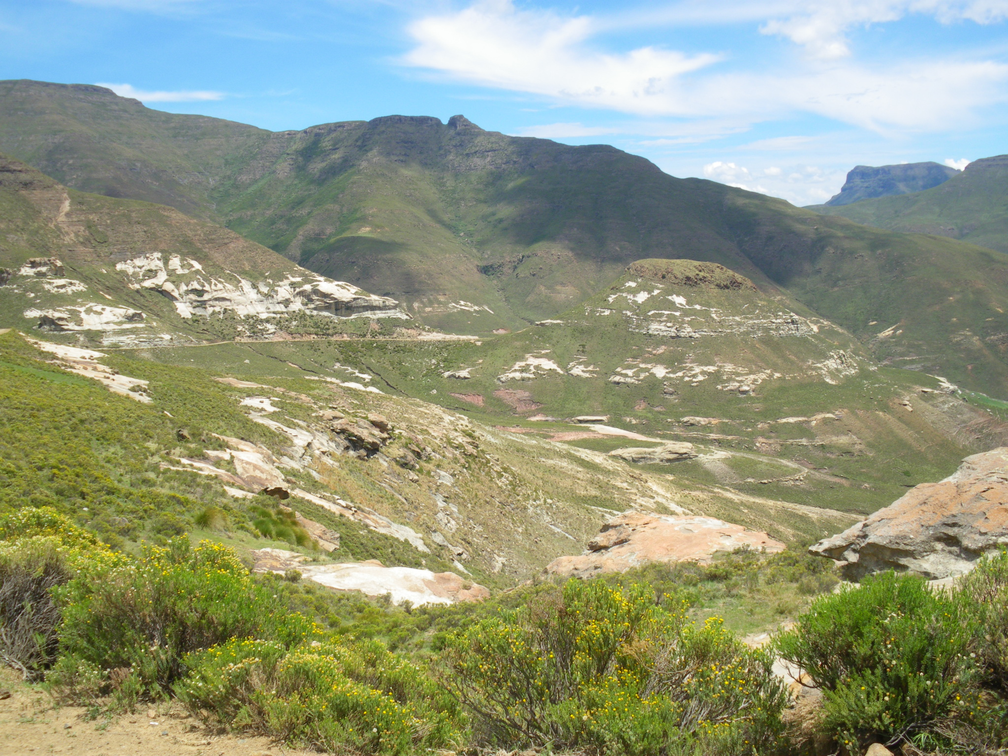 Col de montagne du Lundean's Nek en Afrique du Sud